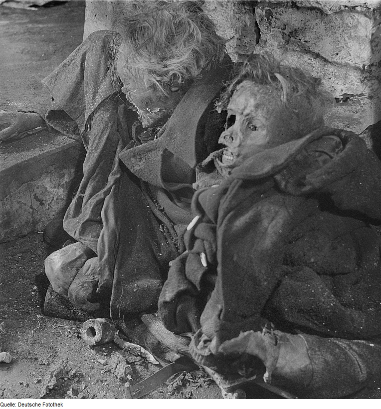 Original image description from the Deutsche Fotothek Zwei Leichen in Mänteln (durch Mumifikation erhalten) nach Freilegung eines Luftschutzkellers